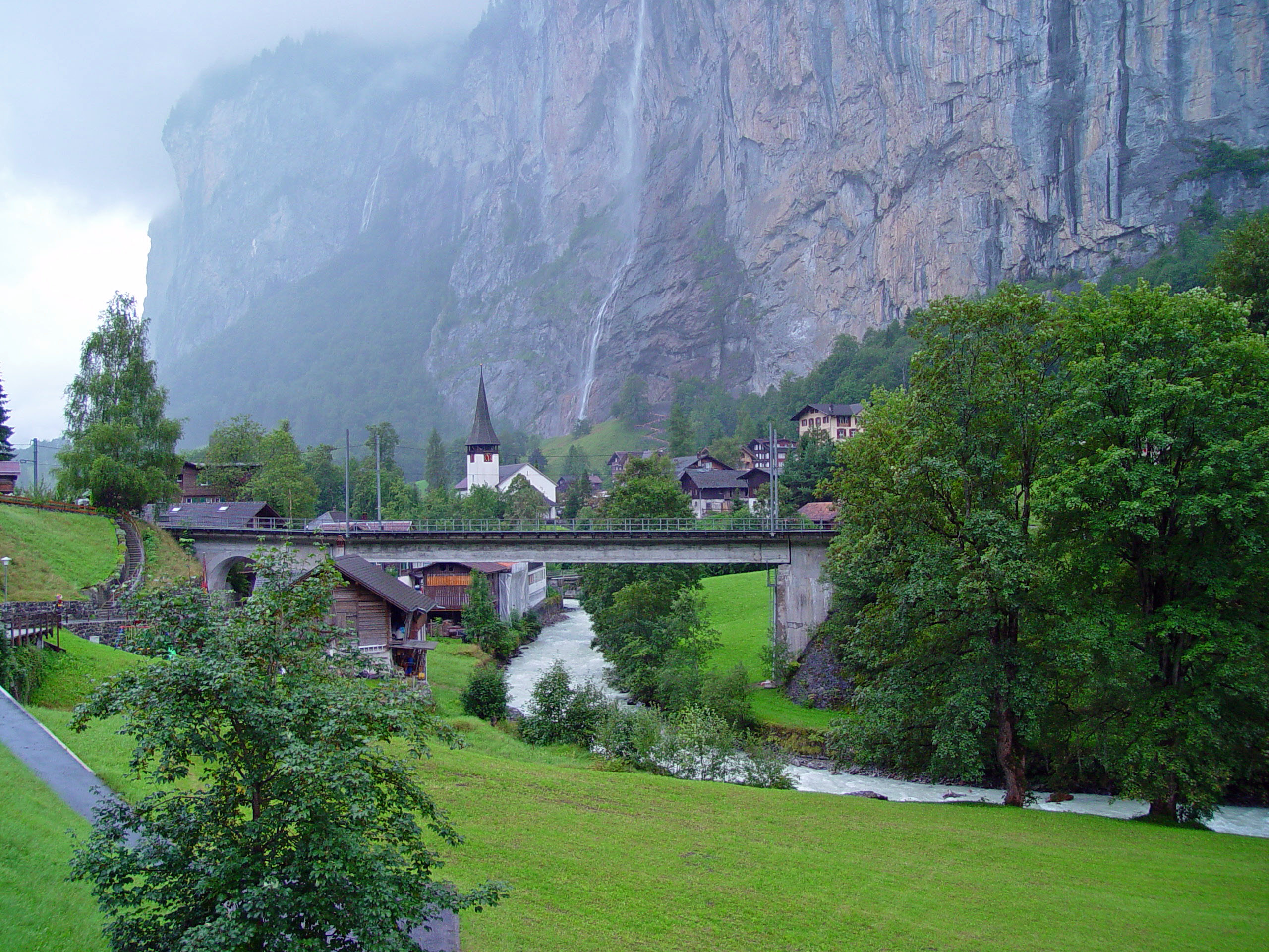 Lauterbrunnen von oben gesehen